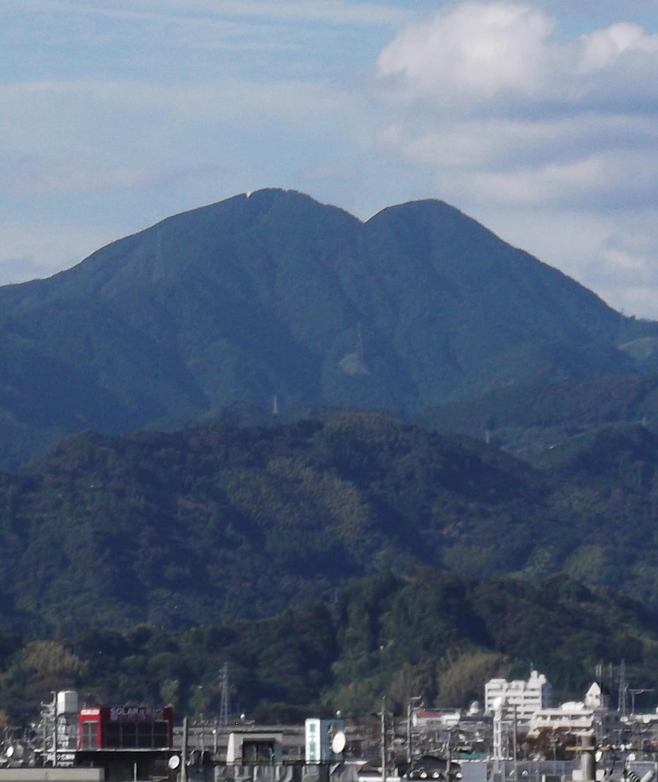 静岡平野から眺めた竜爪山